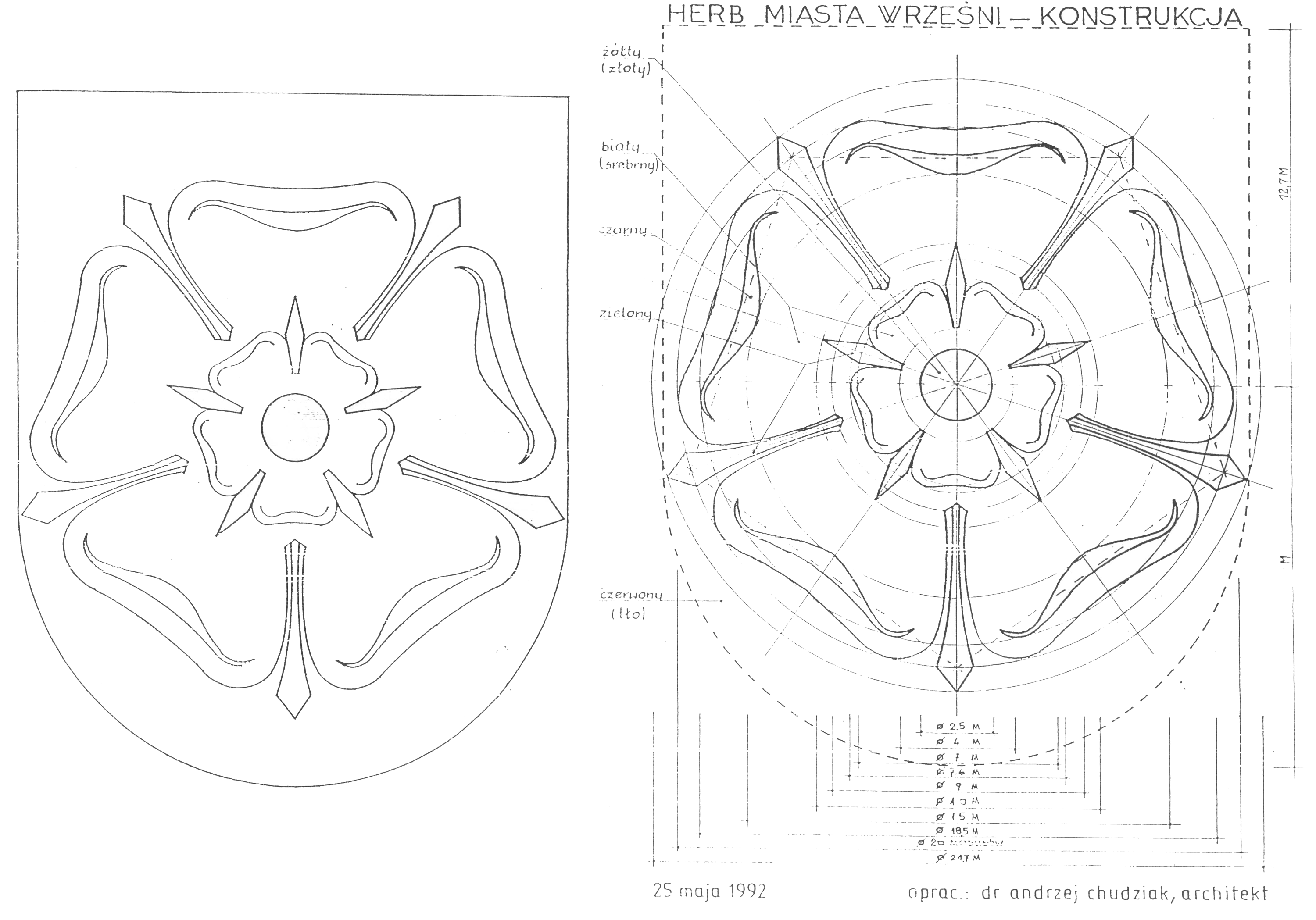 Herb Wrześni